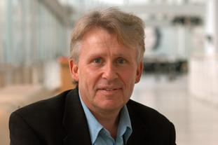 Norbert Abels, 1953 geboren, Publizist, Literaturdozent und Dramaturg